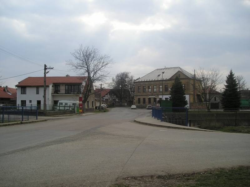 Prokopská náves - střed vesnice Nučice, okres Praha-západ.